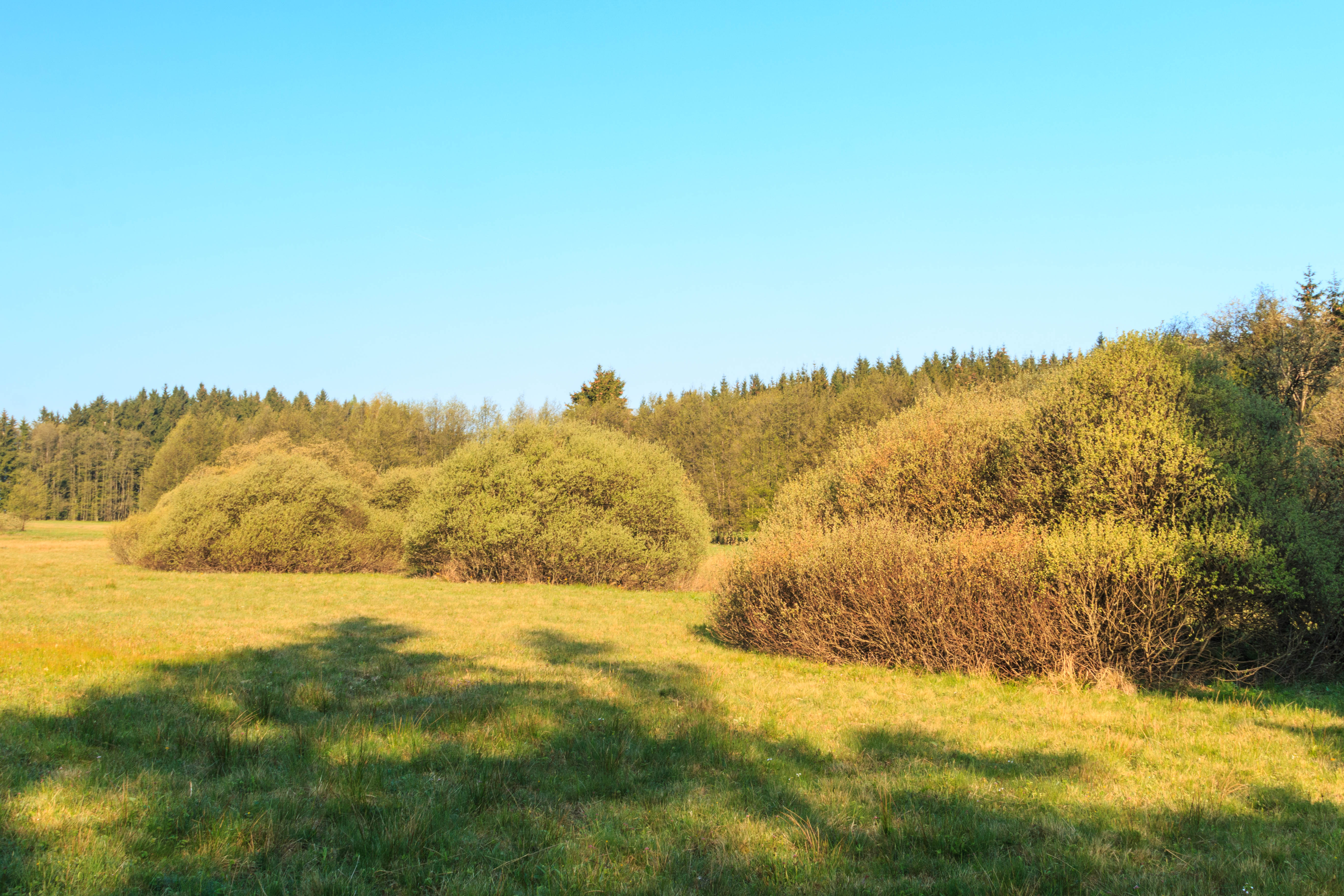 Přírodní památka U Tučkovy hájenky Project: Chráněná území.